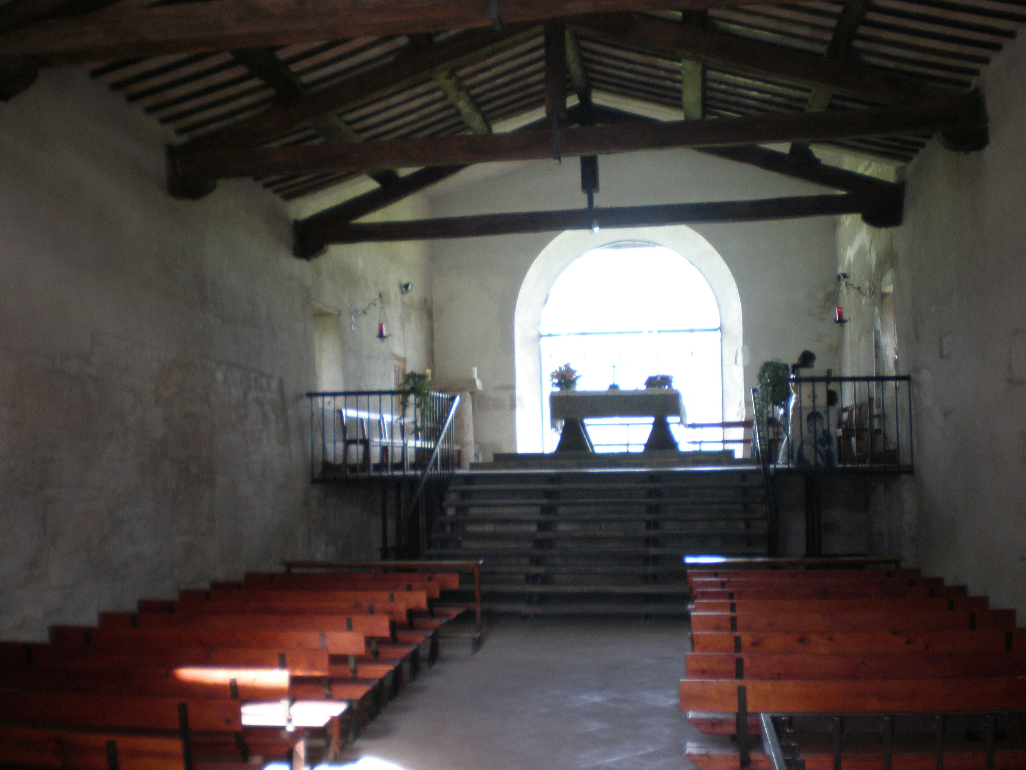 Chiesa di S.Maria di Pistia - interno